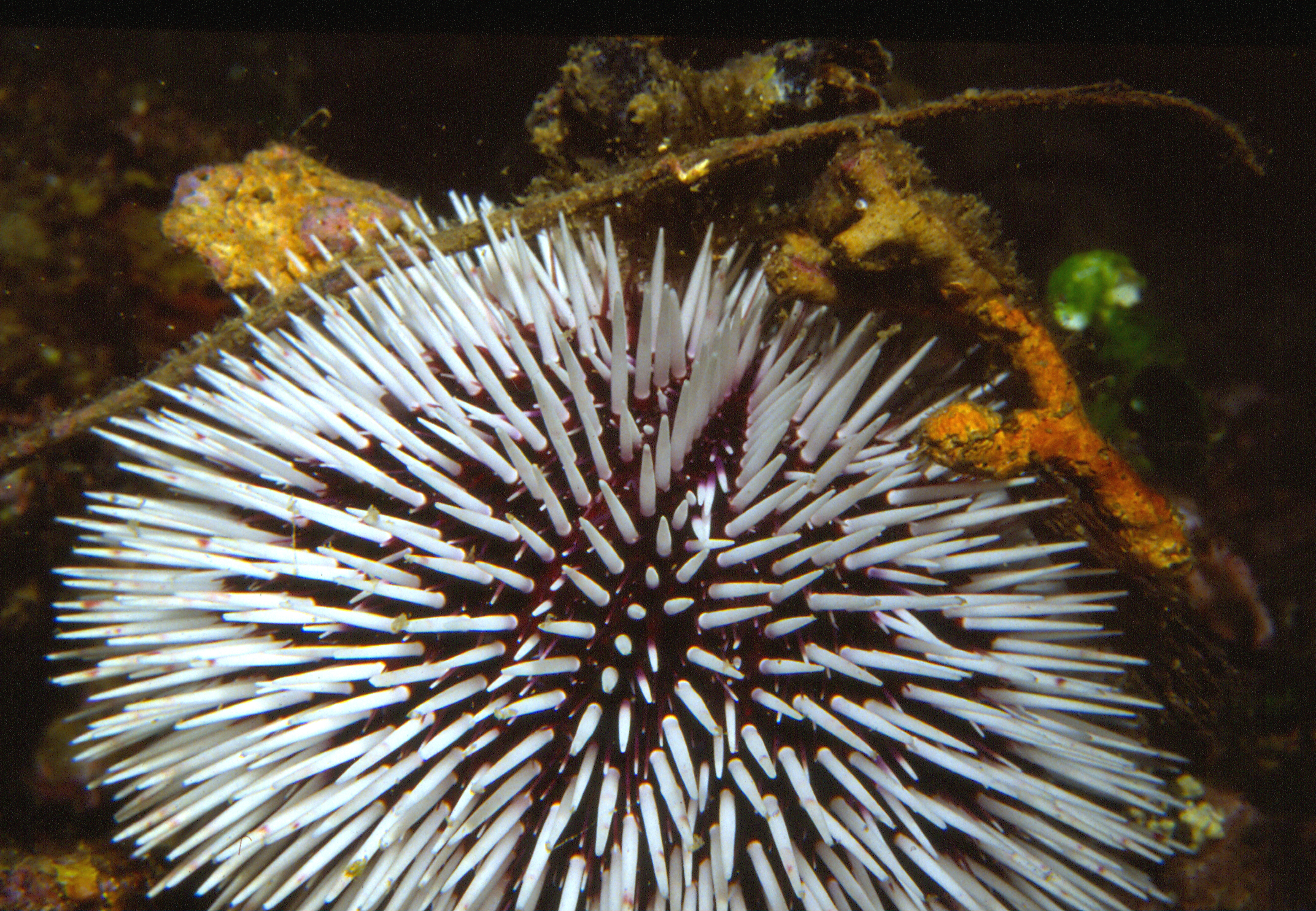 Sphaerechinus granularis (Lamarck, 1816) - Banyuls-sur-Mer : 08/82